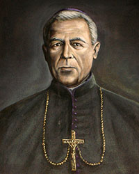 Mons. Carlos Labbé Márquez, Primero Obispo de Iquique.